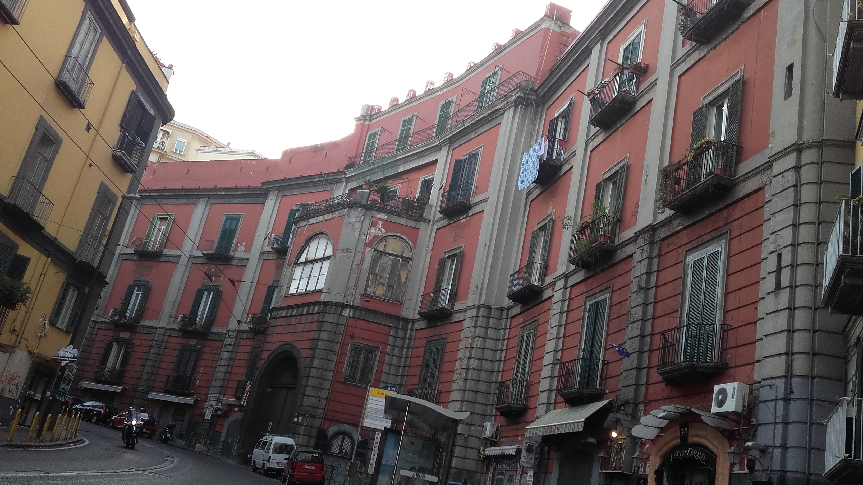 Peculiare palazzo del'700 in via Salvator Rosa